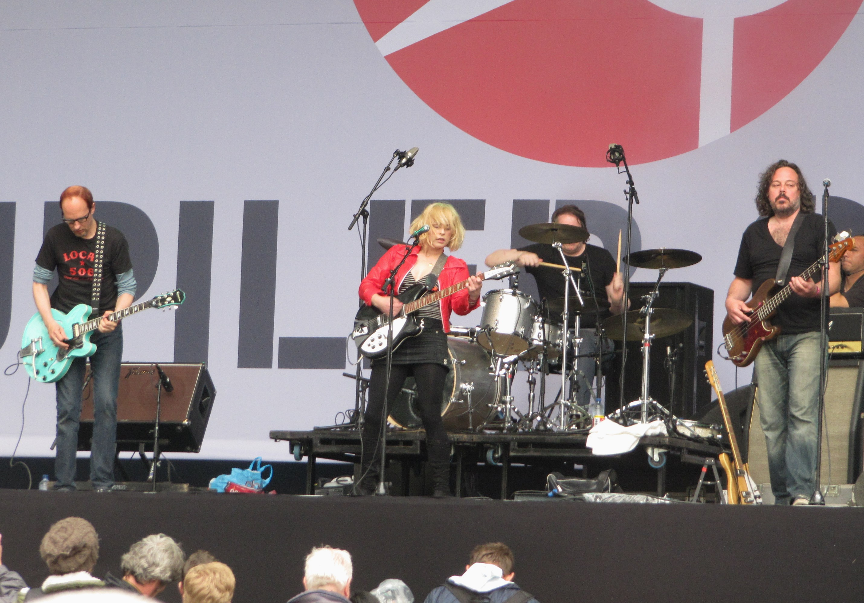 Optreden op Parkpop 2012